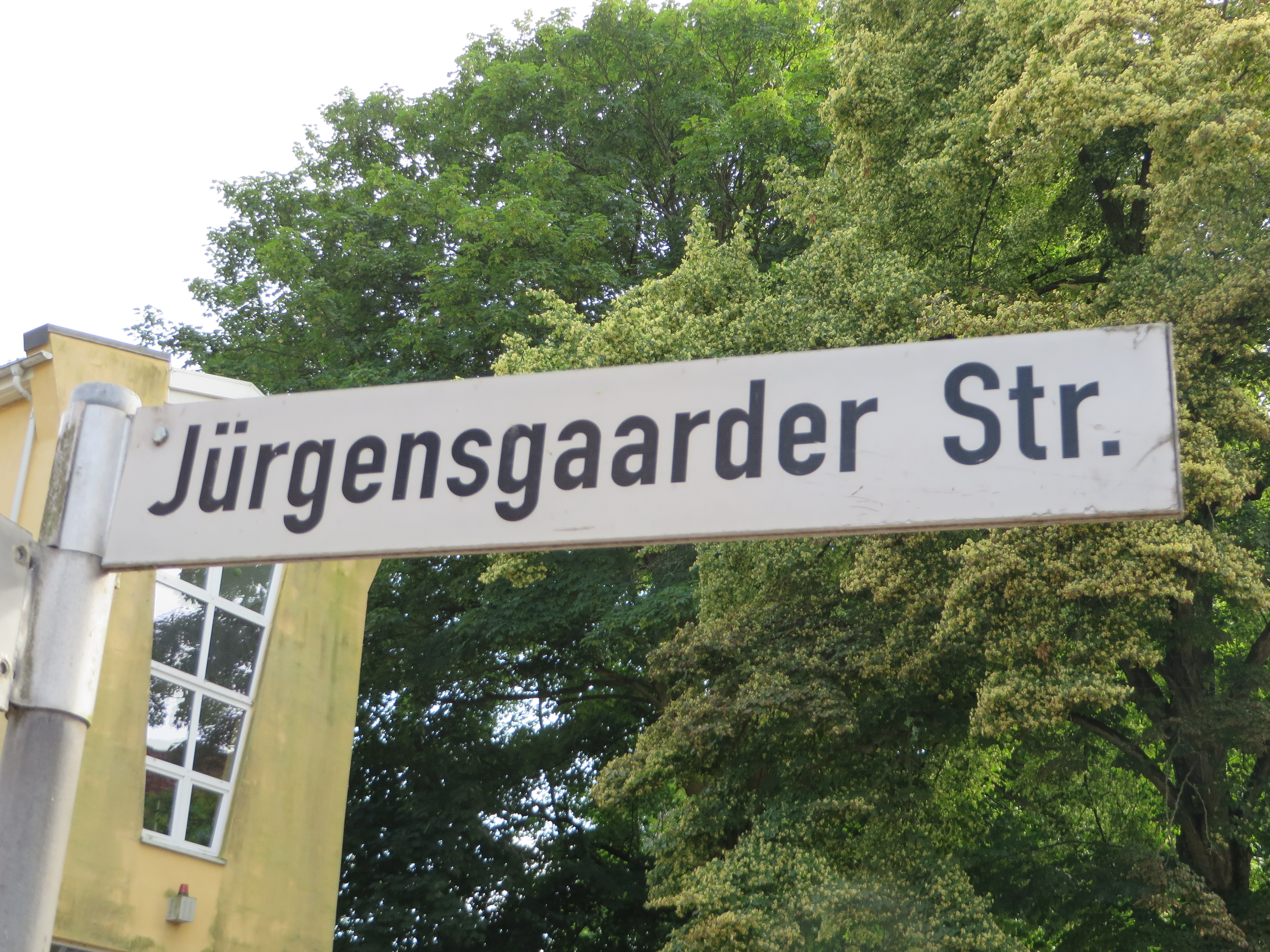 Straßenschild Jürgensgaarder Straße (Flensburg 2014)